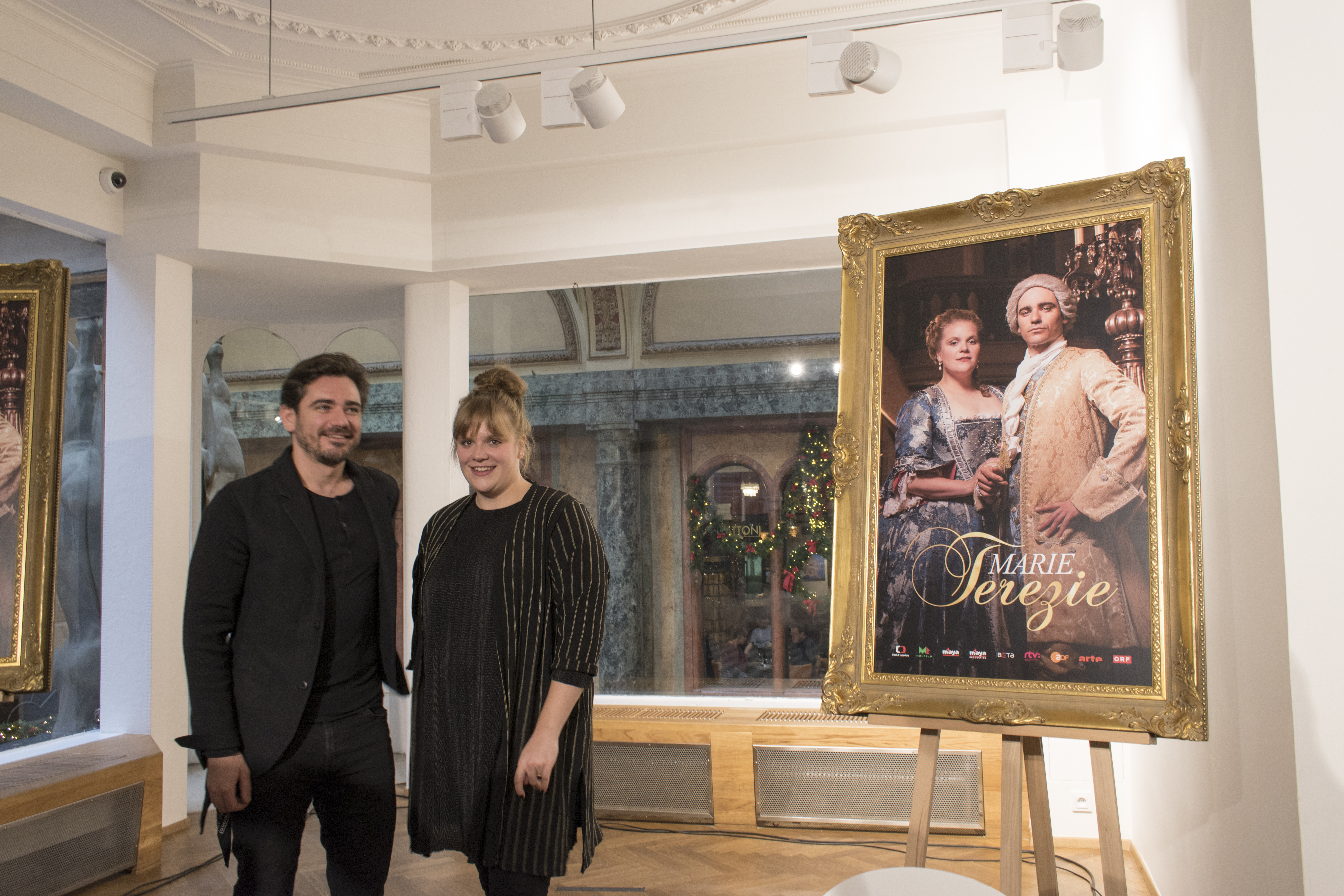 Novinářská konference 9.12.2019. Autor: Blanka Borová (Karolína Černá) pro Kritiky.cz